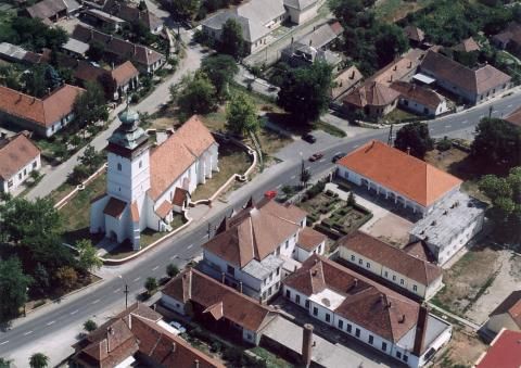 Sajószentpéter, Hungary, aerialphotography